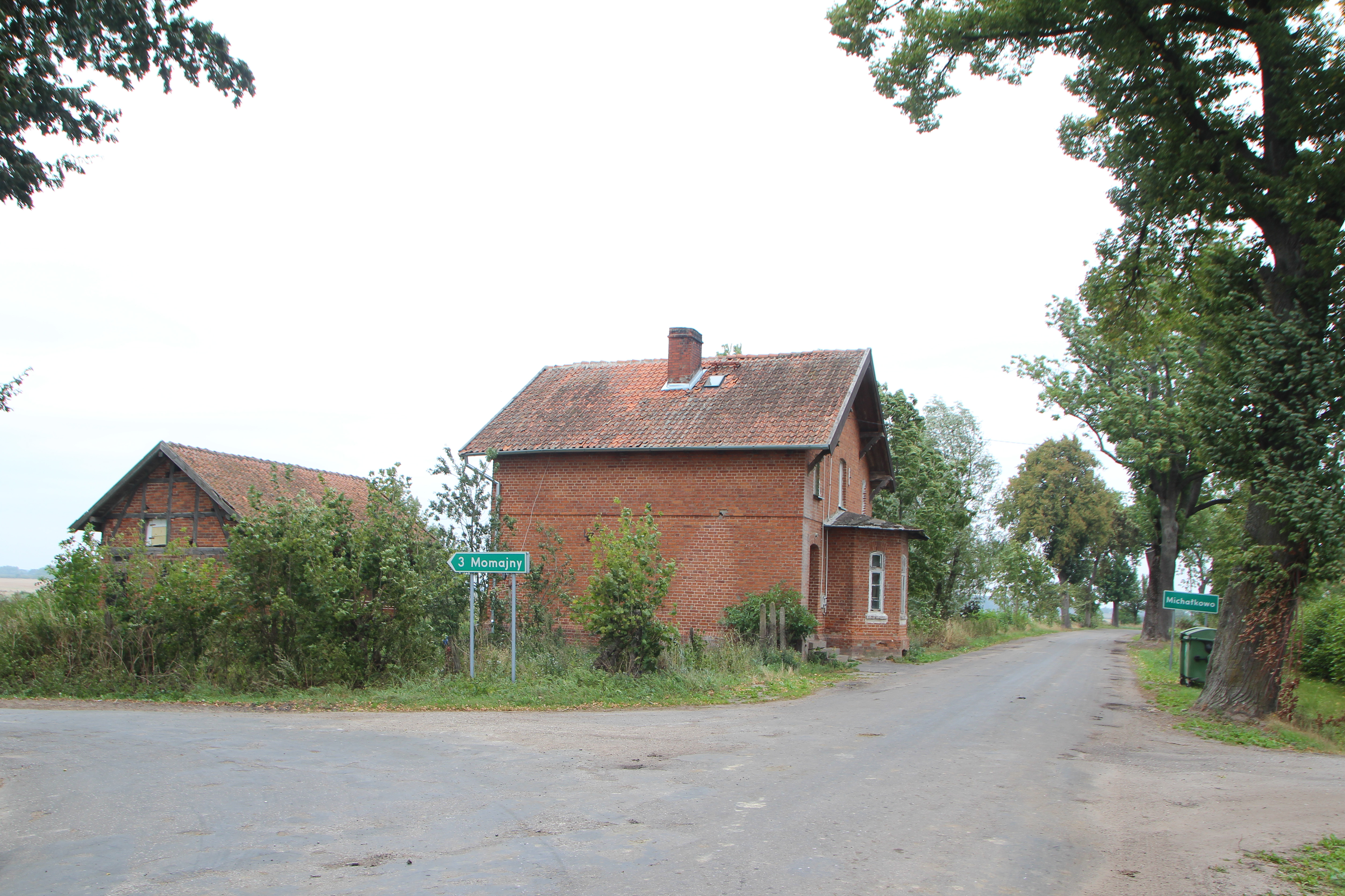 Michałkowo - wieś w Polsce położona w województwie warmińsko-mazurskim, w powiecie kętrzyńskim, w gminie Barciany.